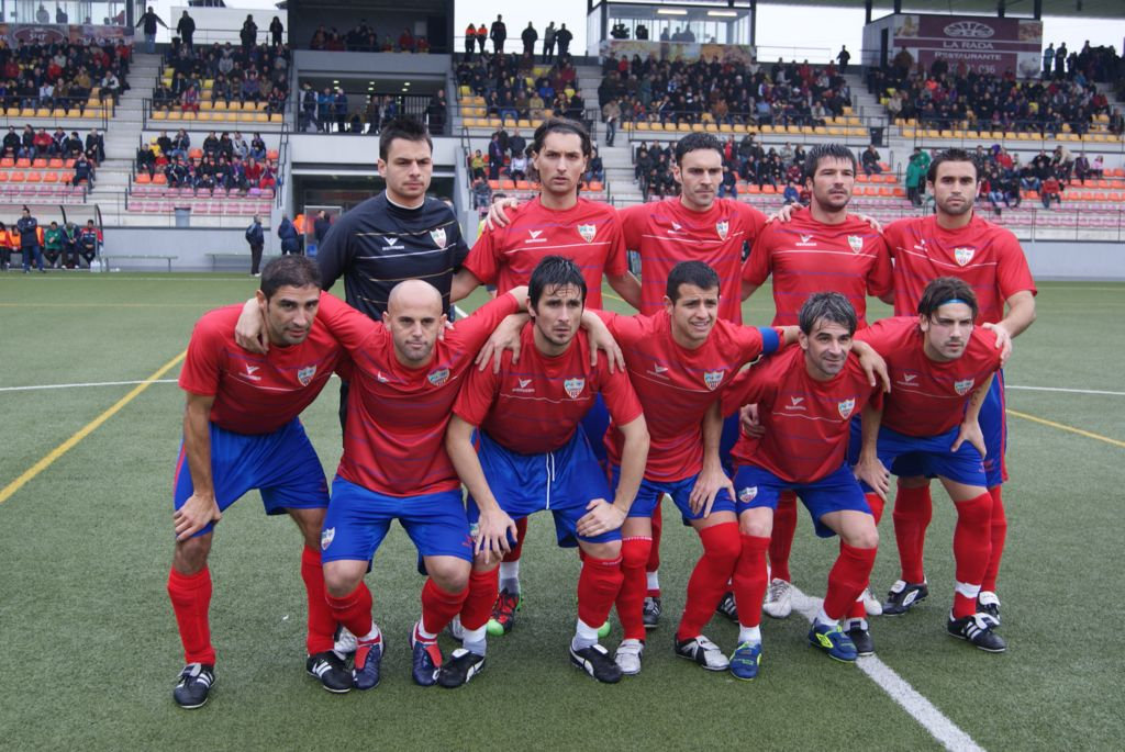 Unión Estepona Club de Fútbol